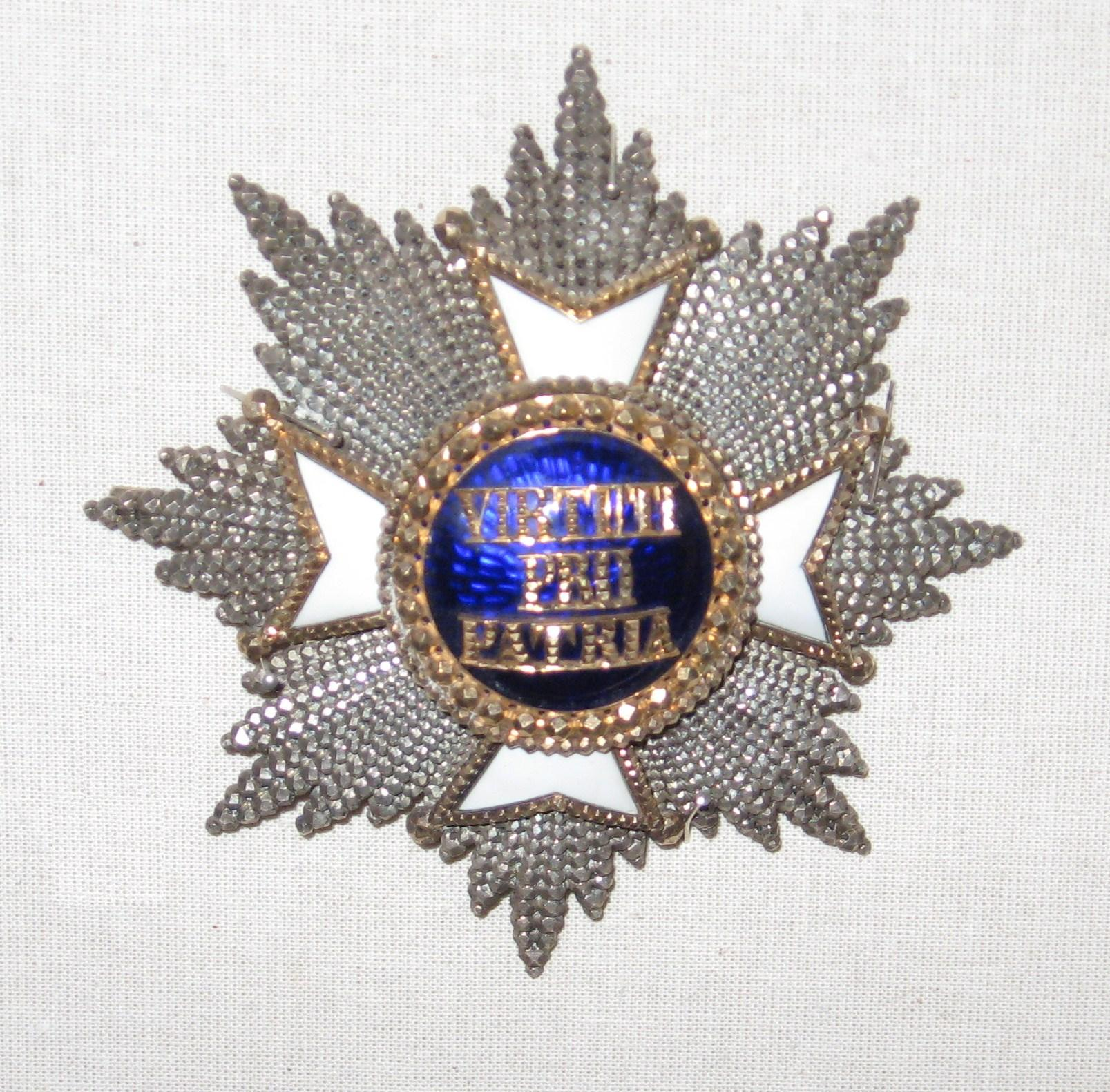 Militär-Max-Joseph-Orden: Stern zum Großkreuz